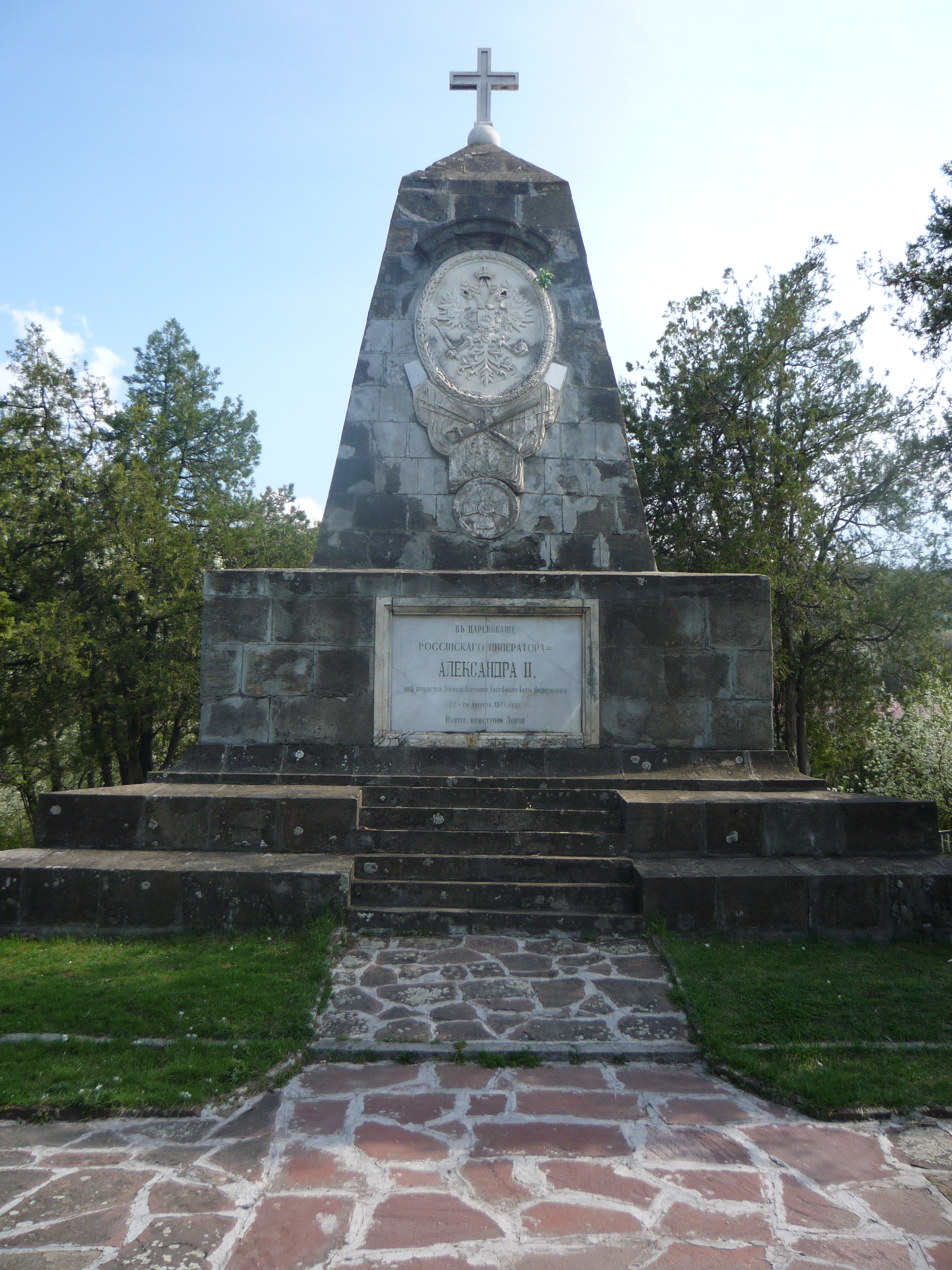 Белия паметник на хълма "Стратеш" в град Ловеч. Издигнат в памет на освобождението на града от османско иго на 22 август 1877г. На него са изписани всички части на Руската армия, участвали в бойните действия.